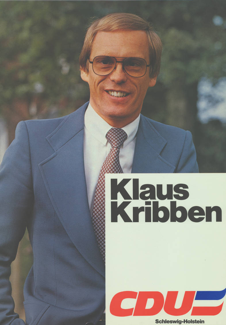 Klaus Kribben CDU Schleswig-Holstein Abbildung: Foto Plakatart: Kandidaten-/Personenplakat mit Porträt Auftraggeber: Verantw.: CDU Schleswig-Holstein Objekt-Signatur: 10-012 : 433 Bestand: Landtagswahlplakate Schleswig-Holstein (10-012) GliederungBestand10-18: Landtagswahlplakate Schleswig-Holstein (10-012) » Landtagswahl am 29.4.1979 » Ankündigungsplakate Lizenz: KAS/ACDP 10-012 : 433 CC-BY-SA 3.0 DE